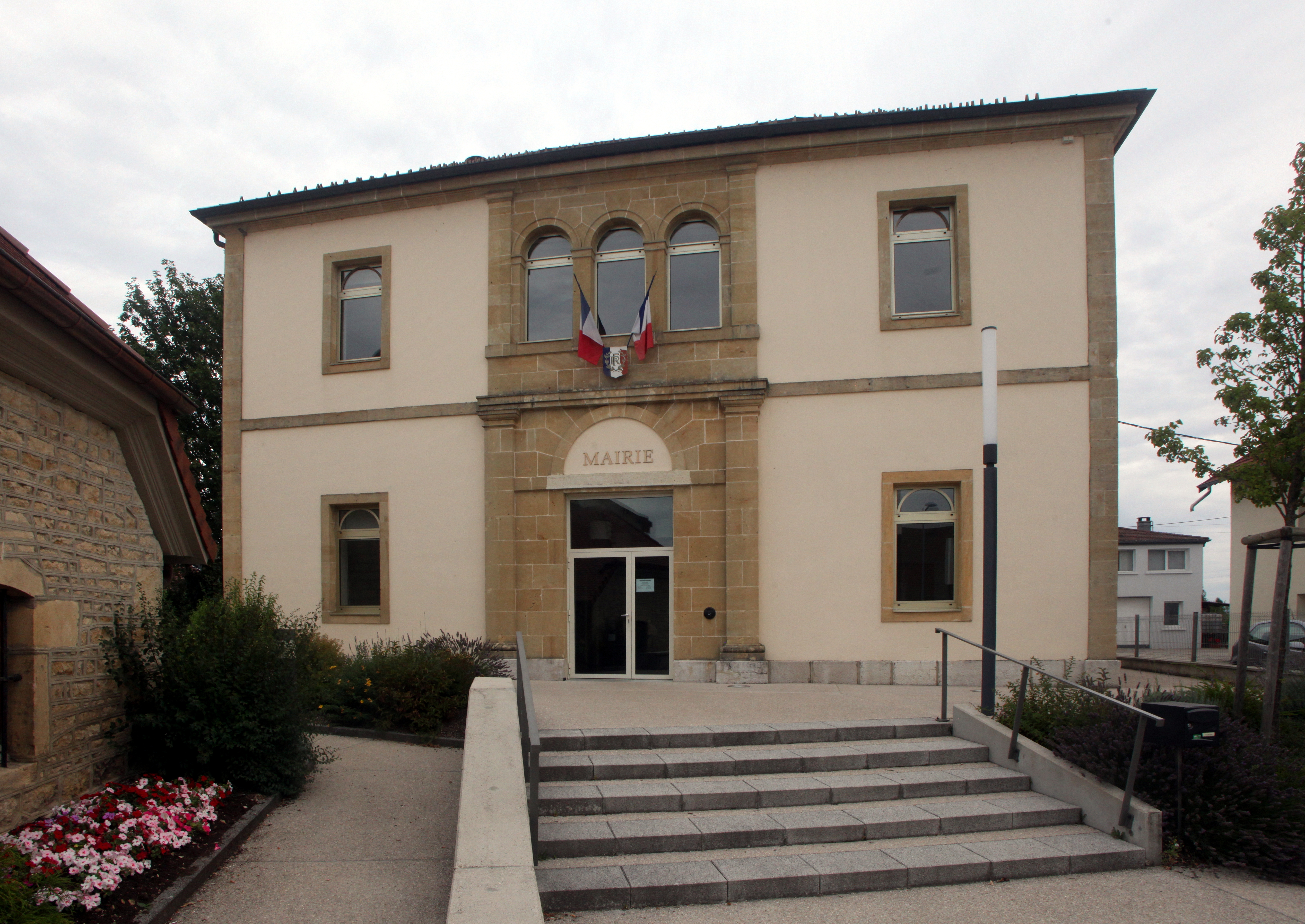 Mairie d'Houtaud (Doubs).